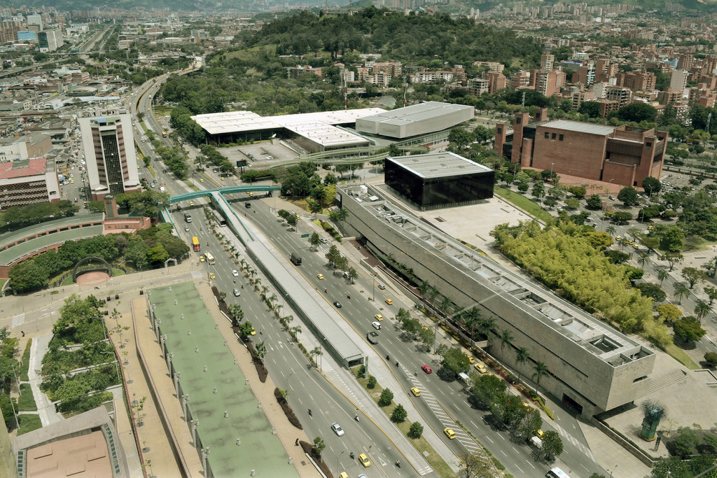 Estación Plaza Mayor (Metroplus)